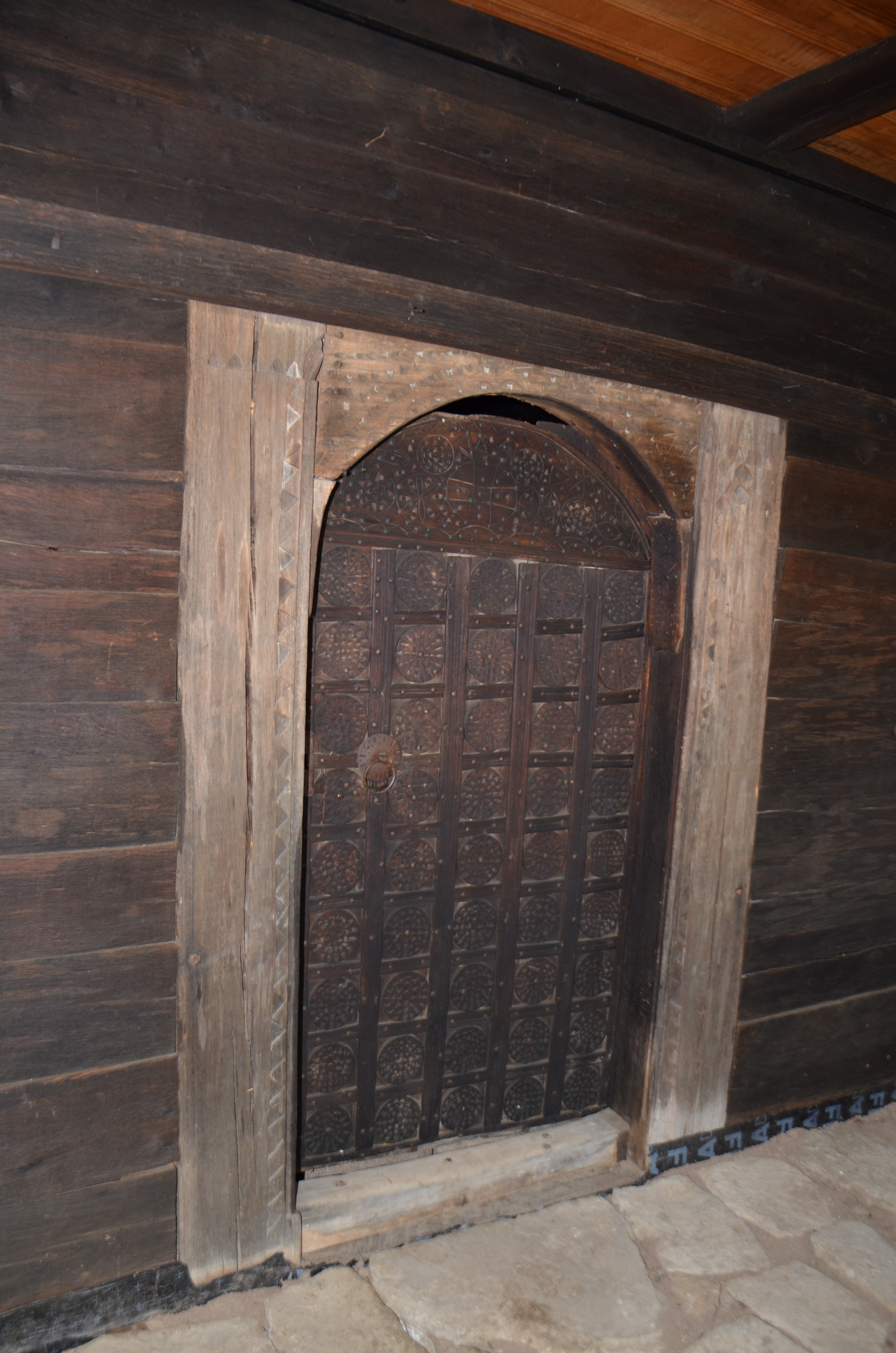 Црква брвнара у Даросави, општина Аранђеловац, Шумадијски округ